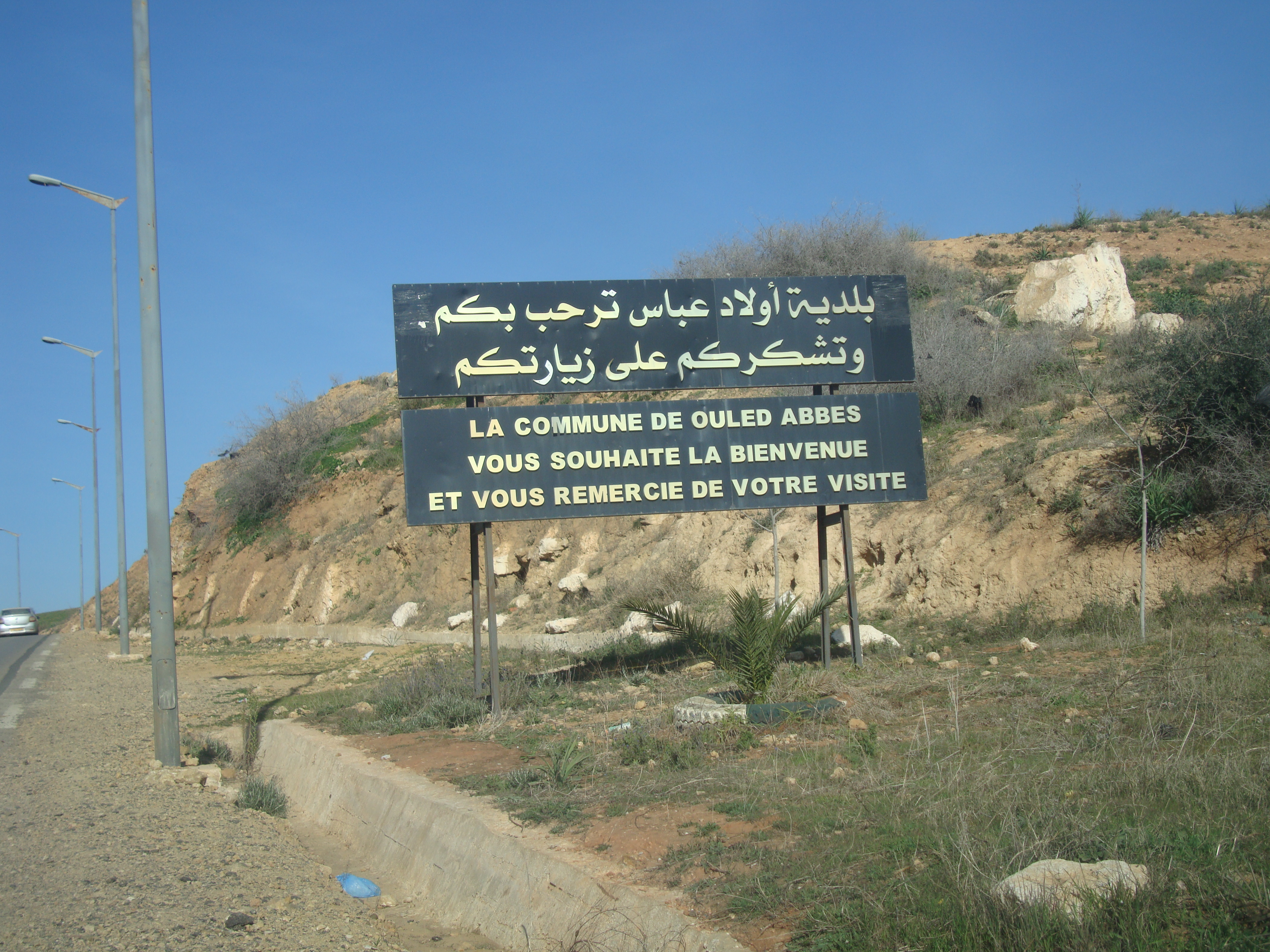 Entrée de la commune.